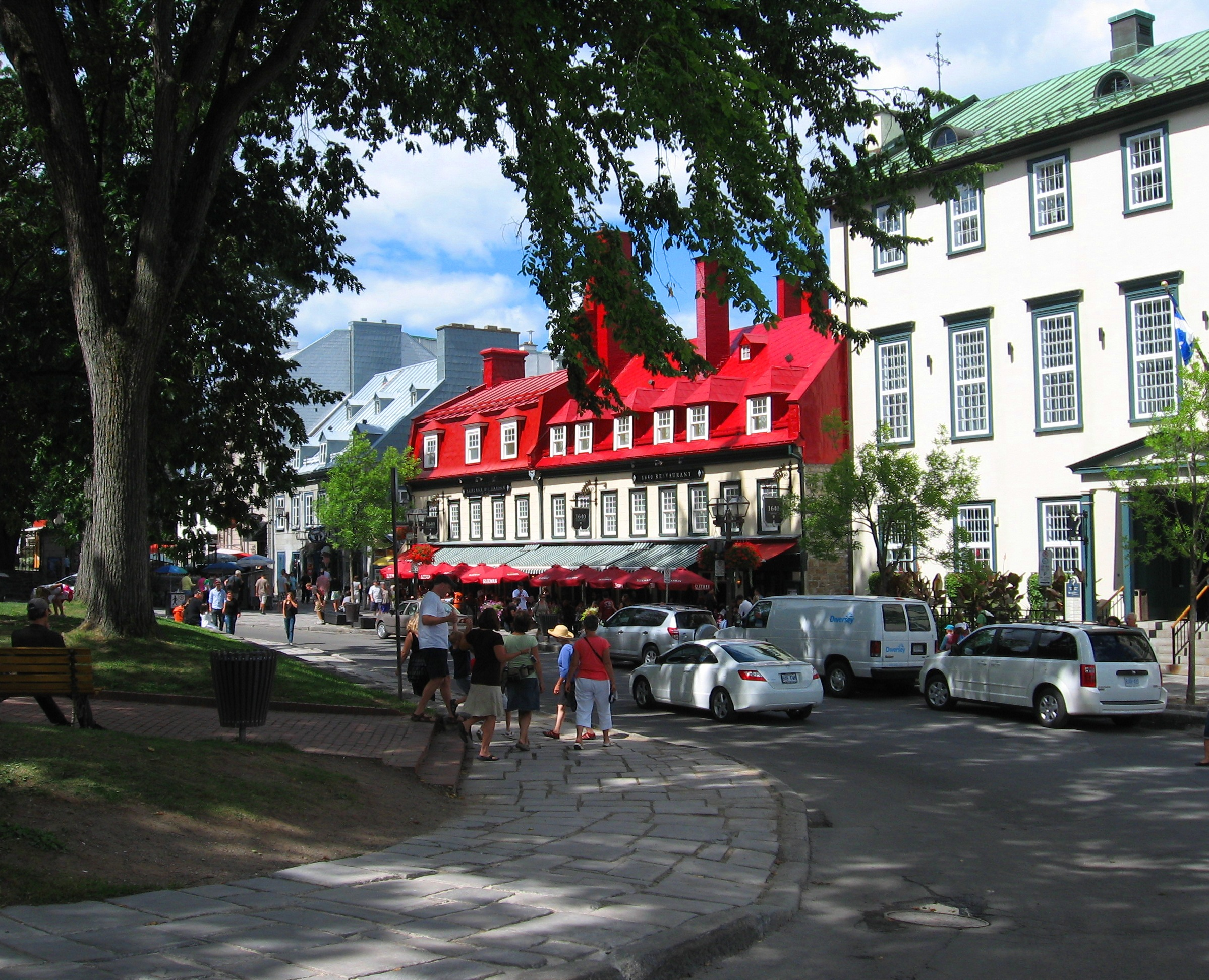 Située au cœur du Vieux-Québec, cette maison d'hôtes se trouve à seulement 450 mètres du Château Frontenac. Elle vous propose des chambres avec connexion Wi-Fi gratuite et un restaurant servant une cuisine française raffinée. Toutes les chambres contemporaines de l'Auberge du Trésor comportent une salle de bains privative et la télévision par câble. Certaines chambres sont ornées de murs en briques apparentes et/ou offrent une vue sur le Château Frontenac. Le Restaurant 1640 est spécialisé dans une cuisine française classique. Vous pourrez savourer vos repas en plein air sur la terrasse durant les mois d'été. L'Auberge du Trésor de la ville de Québec se situe à moins de 3 km des festivités d'hiver du Carnaval de Québec. Vous serez également à seulement 10 minutes à pied du Moulin à images, l'événement artistique qui se déroule chaque année en été. Réf.